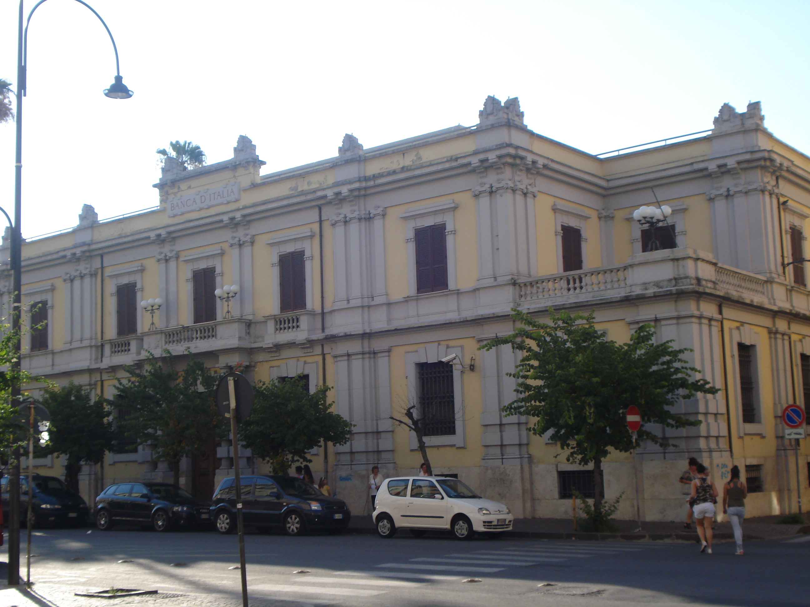 Prospetto laterale della Banca d'Italia su Corso Umberto a Cosenza